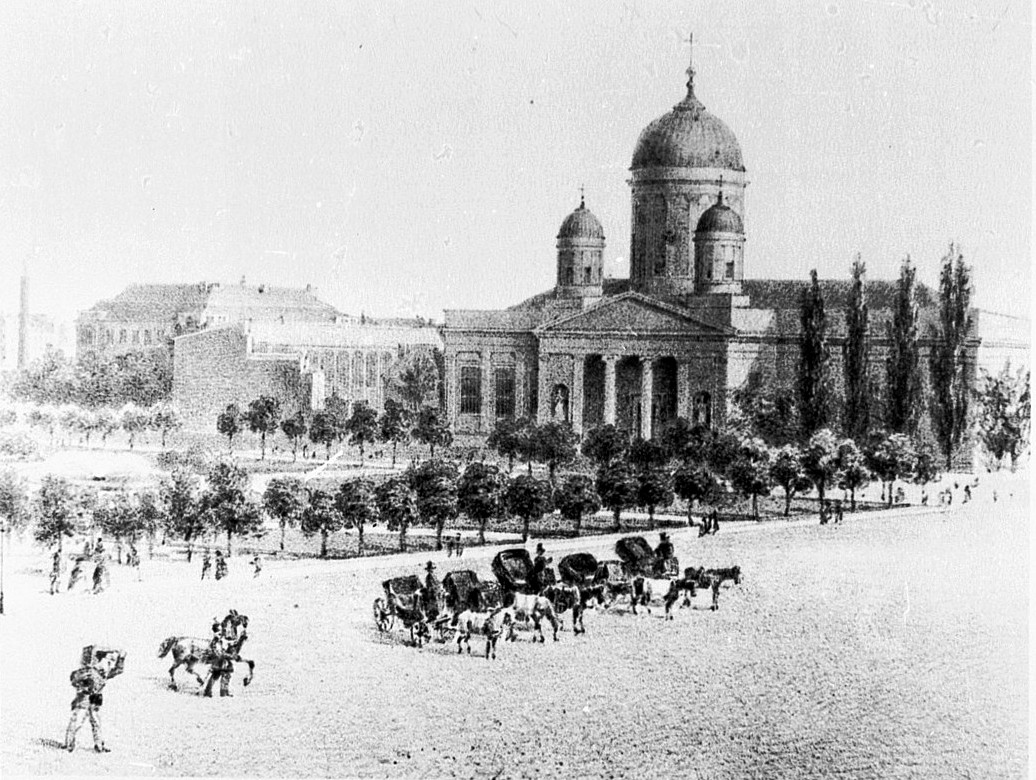 Der ältere Berliner Dom in der von K. F. Schinkel erweiterten Form mit Campo Santo (links).